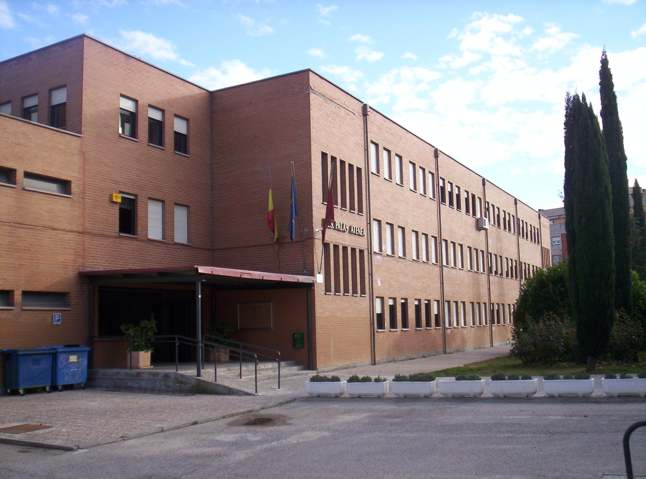 IES Palas Atenea de Torrejón de Ardoz. Jardín de la entrada.